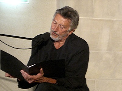 Christian Brückner bei einem Auftritt im Kulturhistorischen Museum Magdeburg